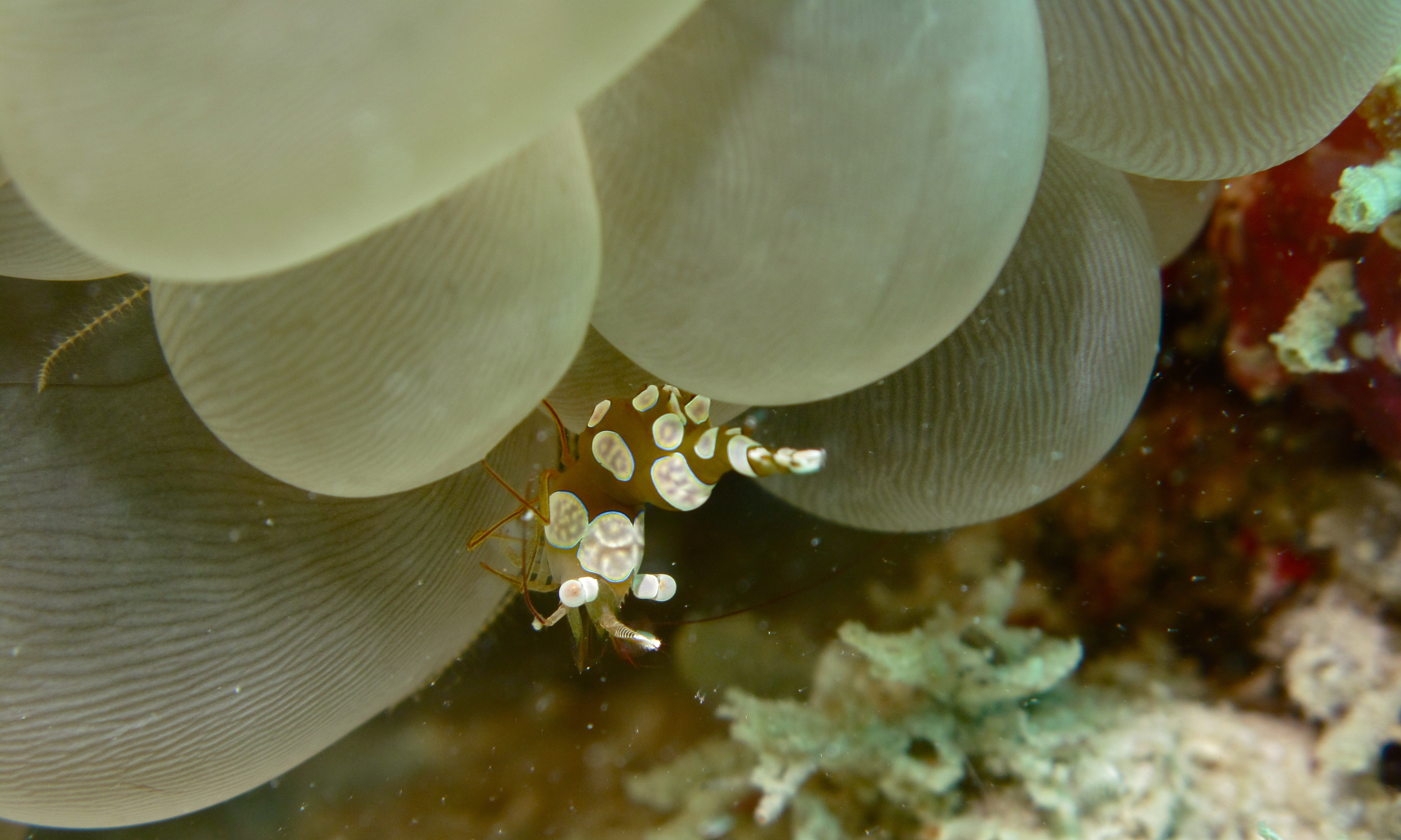 Mabul SWV, Pulau Mabul, Sabah, MALAYSIA